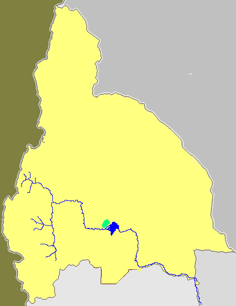 Mapa de la provincia de San Juan Argentina donde se observa un mancha verde, esa misma nos muestra la superficie que ocupa el oasis agrícola del Valle de Ullum. Mientras que las líneas celestes el Río San Juan, y la mancha celeste el Embalse Ullúm